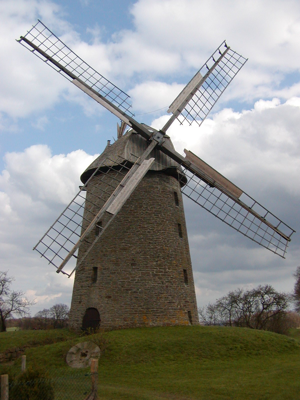 Königsmühle Seelenfeld, Petershagen, Kreis Minden-Lübbecke